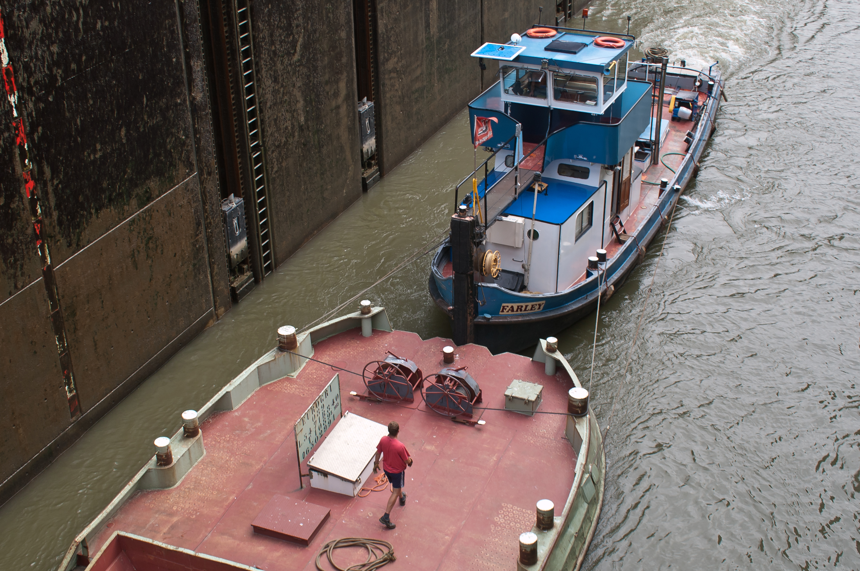 Das Schubboot "Farley" bei der Ausfahrt mit einem mit Sand beladenen Leichter nach Talschleusung aus der Schleuse Maasbracht im Julianakanal. Gut zu erkennen ist der mittels gespannter Stahlseile vorgenommene Kopplung der beider Wasserfahrzeuge und der Vordersteven des Schubbootes.